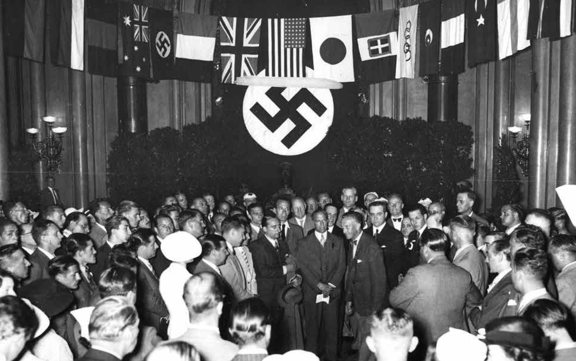 Labougle presencia el cordial recibimiento a la delegación argentina, julio de 1936. Departamento Documentos Fotográficos. Inventario 192623.